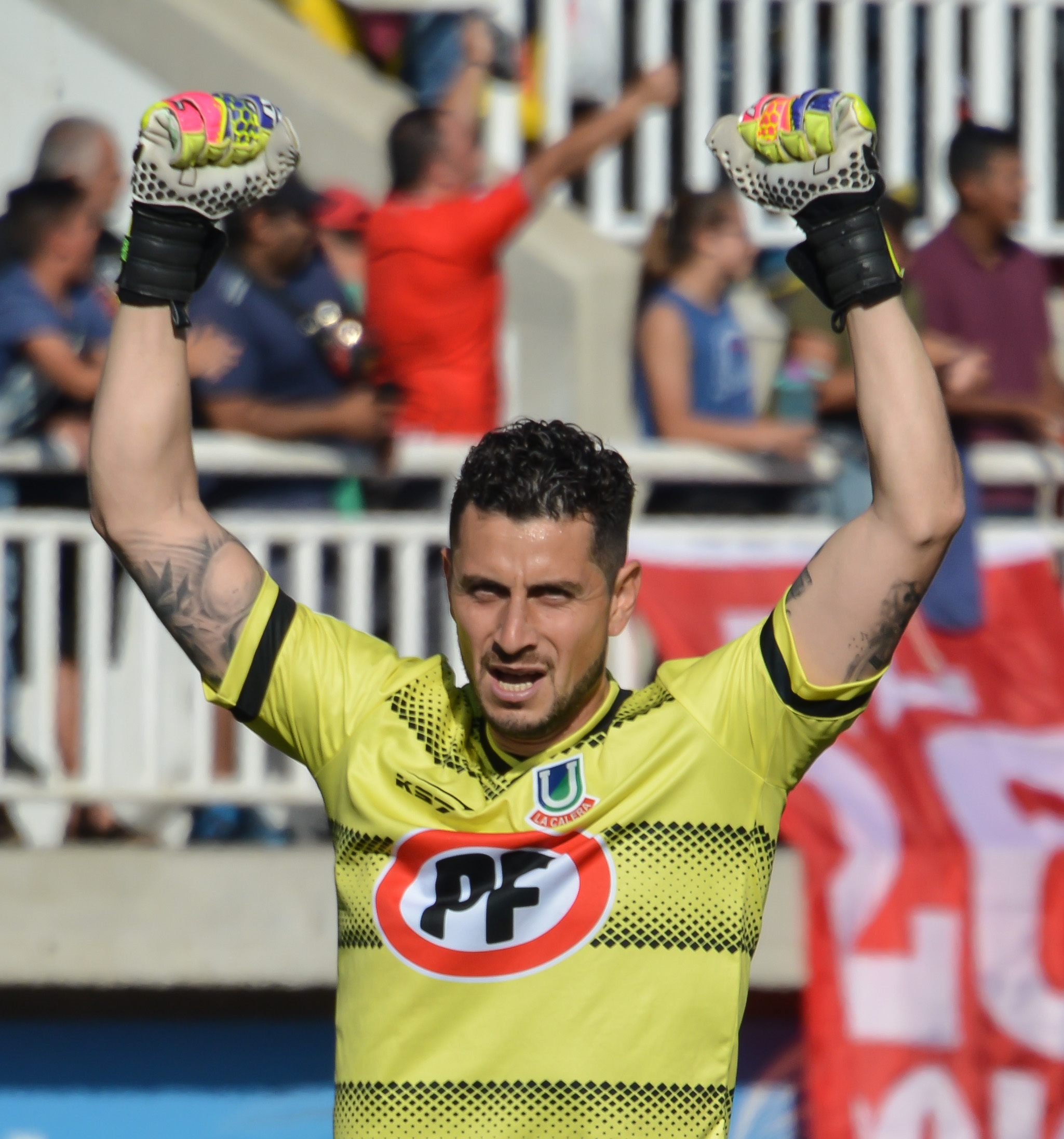 Unión La Calera v Universidad de Chile, Estadio Municipal Lucio Fariña Fernández, Quillota, Chile.